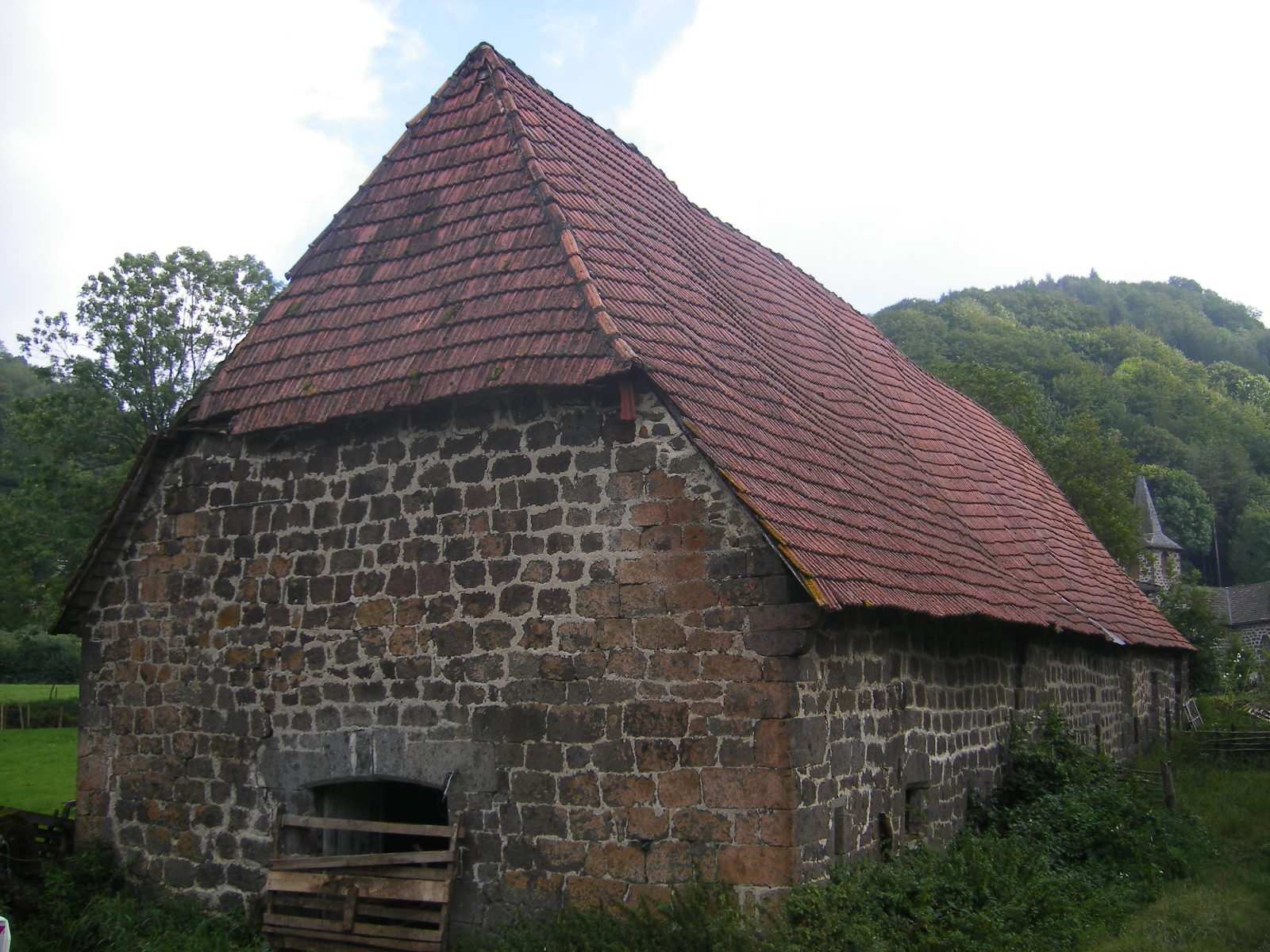 Velzic